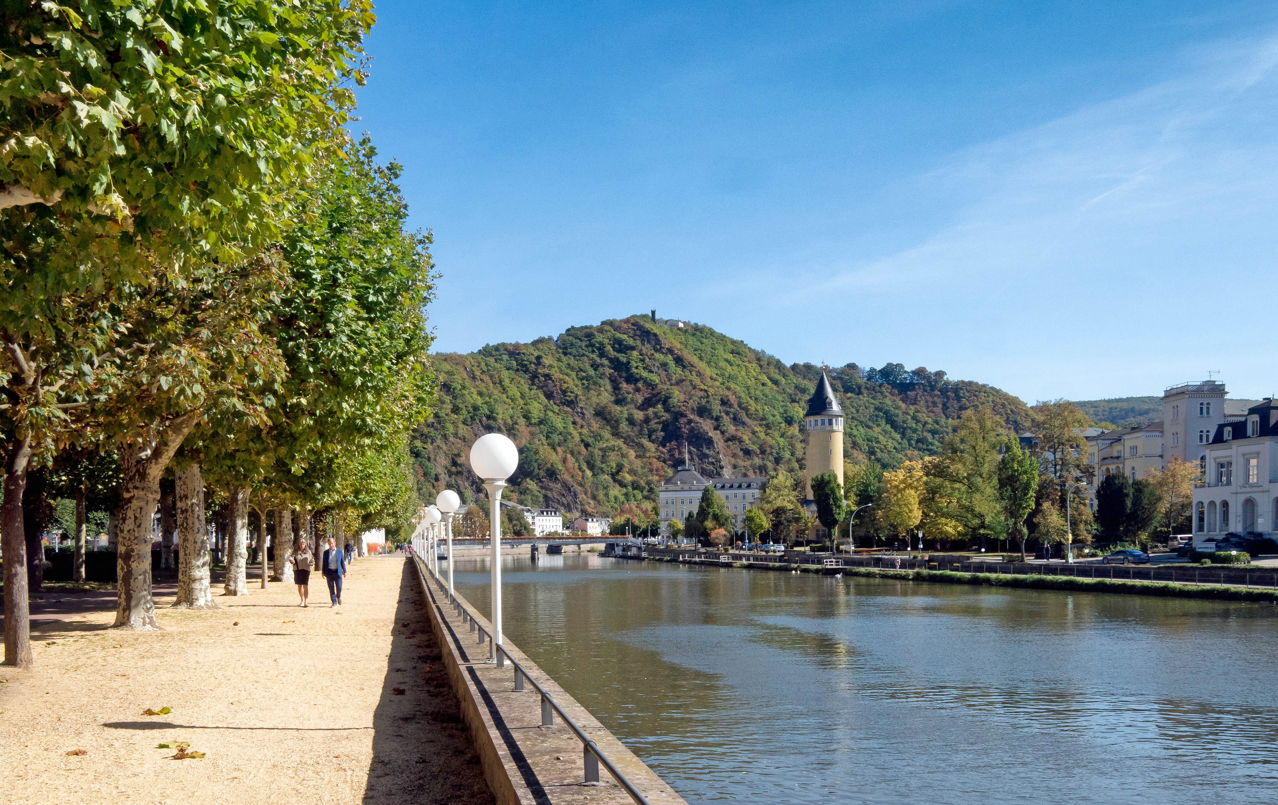 Hier flanieren die Kurgäste entlang der Lahn.